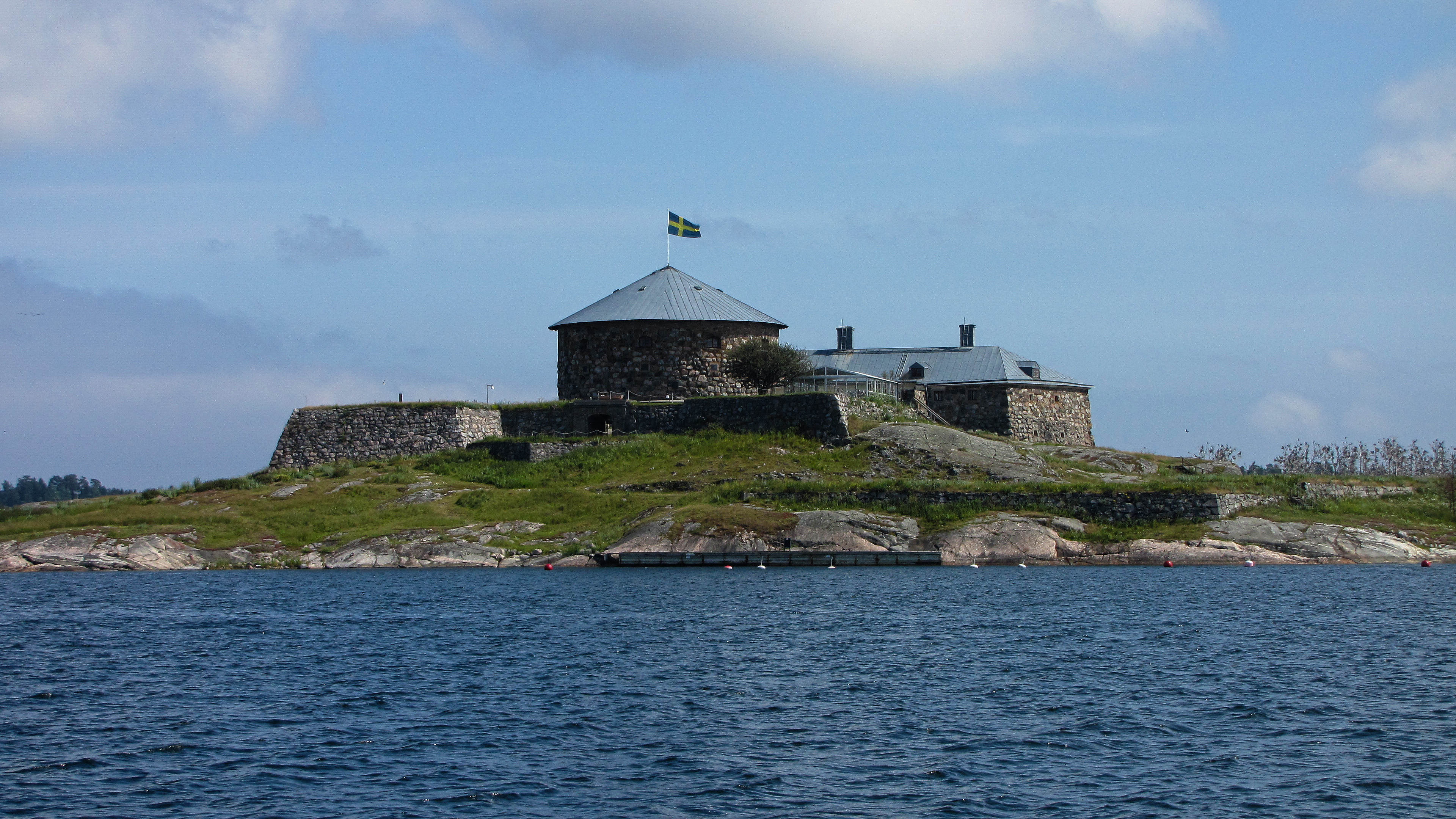 Dalarö skans, sommaren 2011